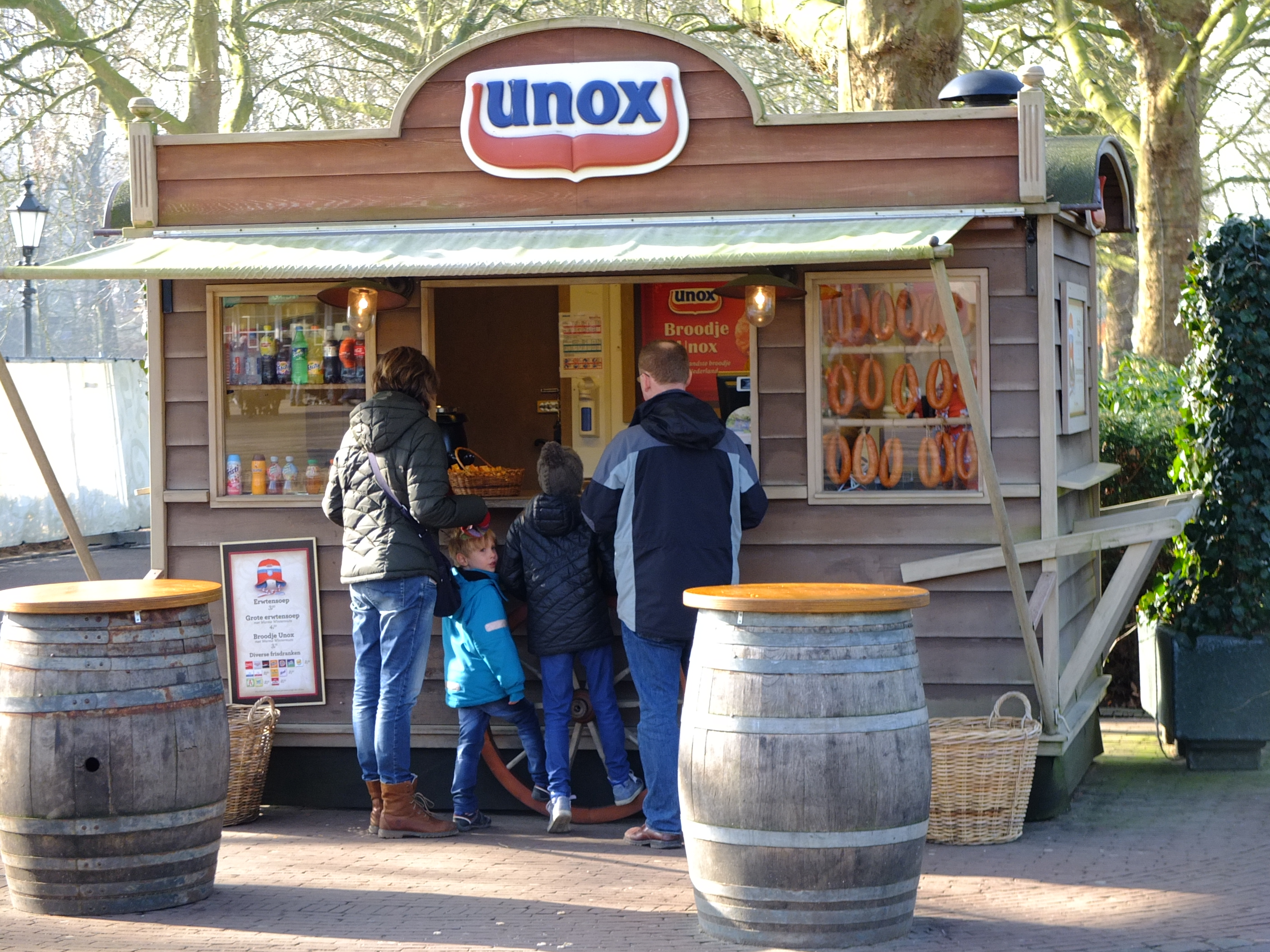 Mobiel Unox worstenkarretje in de Efteling